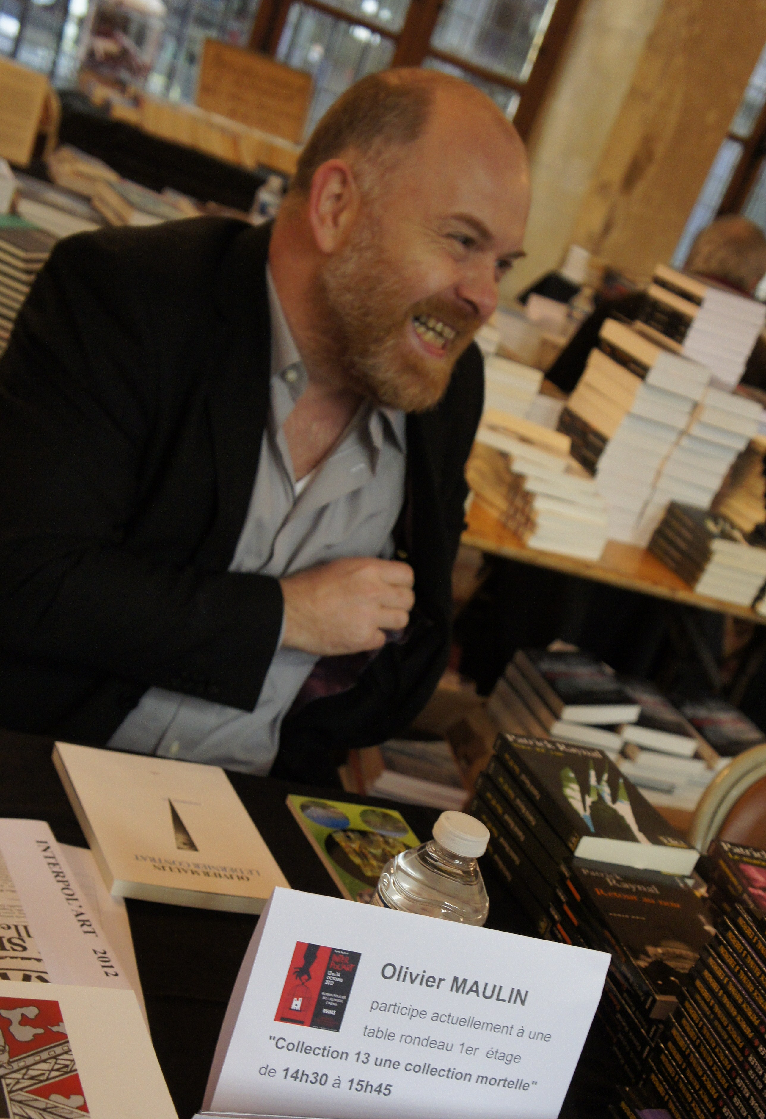 Dédicaces d'Olivier Maulin lors du festival inter pol'art.